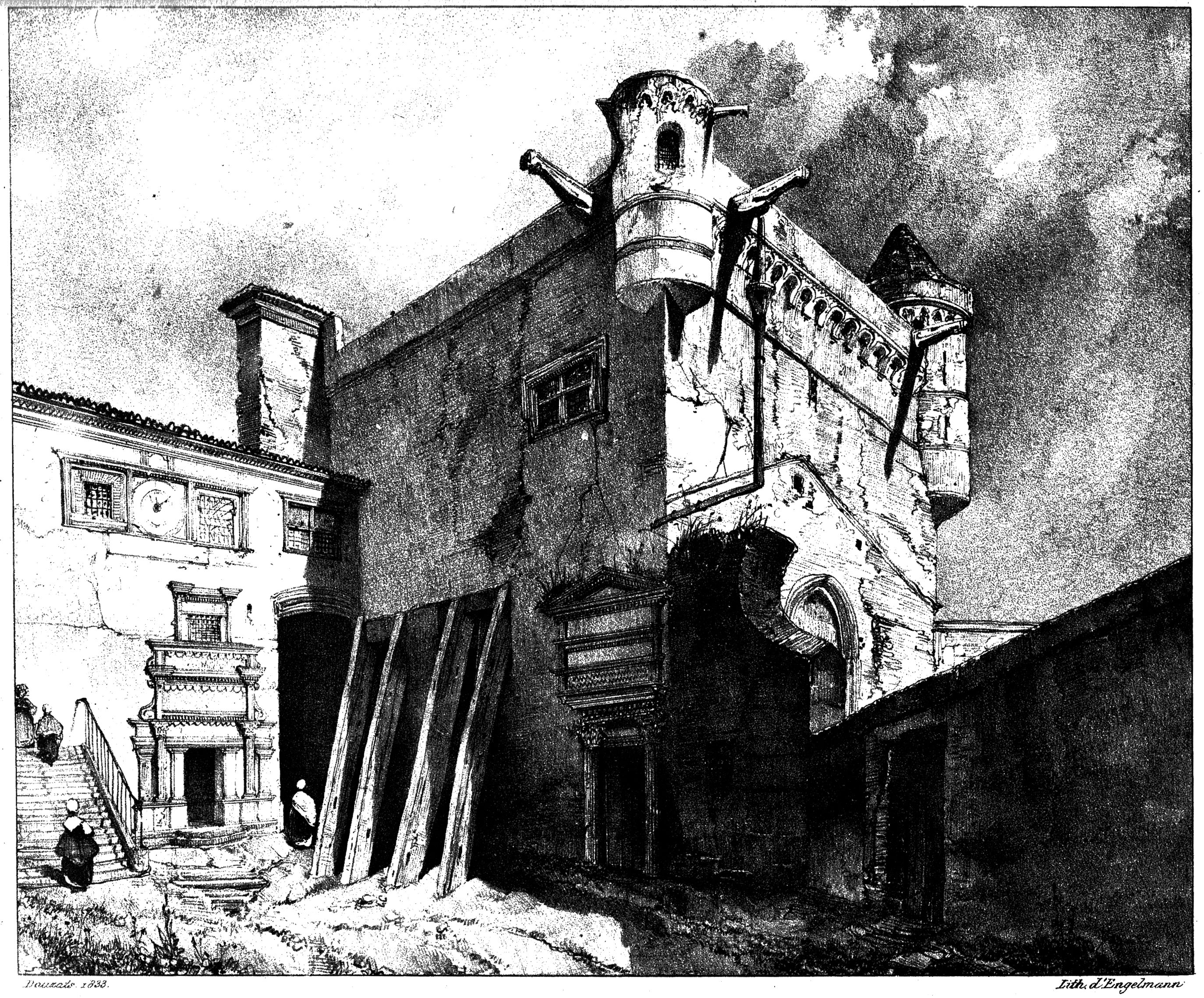 Авар: Seconde cour du Capitol (sic), lithographie début XIXe s., extrait des "Voyages pittoresques et romantiques dans l’ancienne France", par le baron Taylor et Charles Nodier, album Languedoc : représentation du donjon du Capitole de Toulouse (Haute-Garonne)